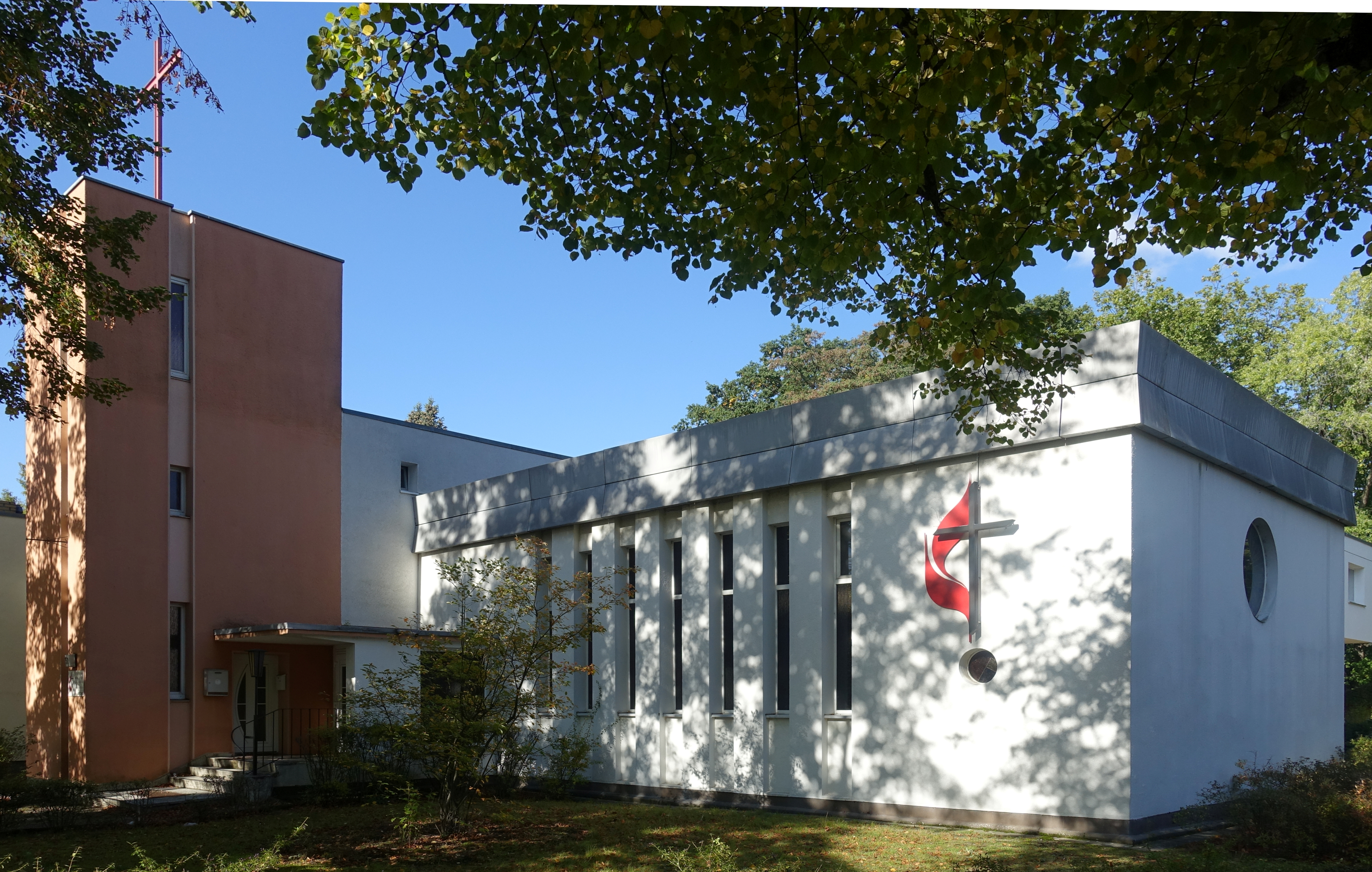 Straßenansicht der Lindenkirche